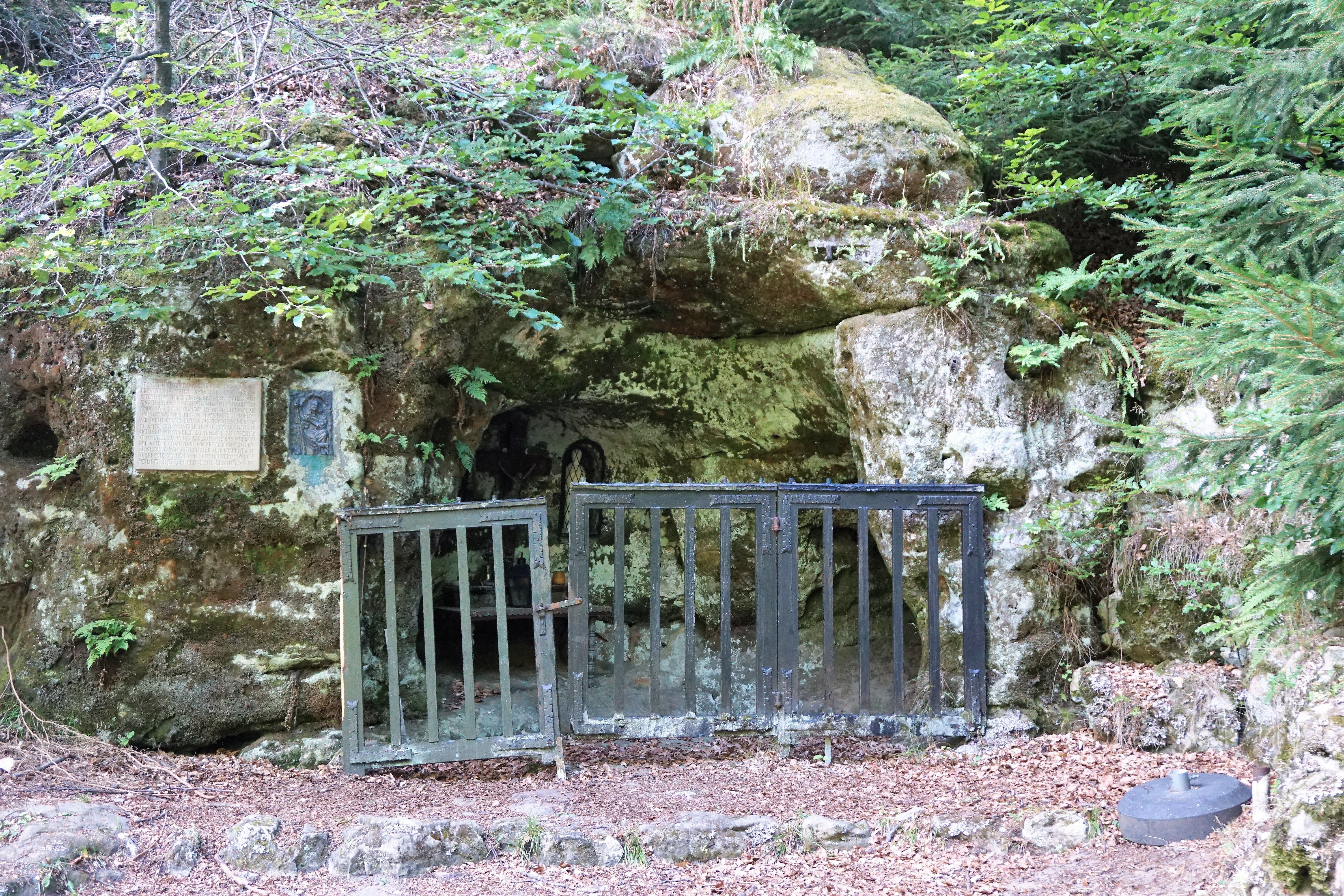 Grunewald, commune de Steinsel. Grotte de Schetzel.